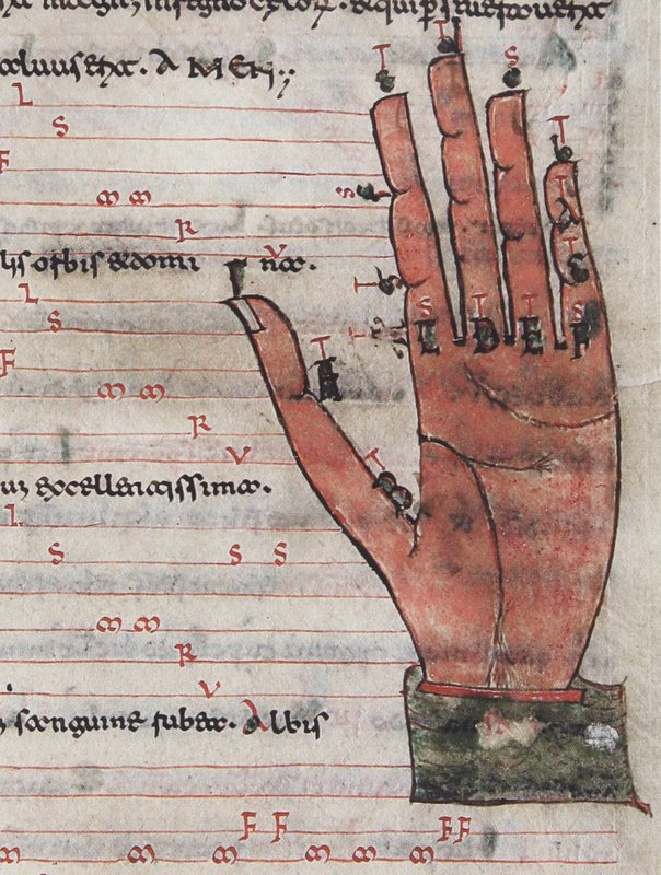 La "mano guidoniana" (manus Guidonica), ausilio mnemonico per lo studio della musica.